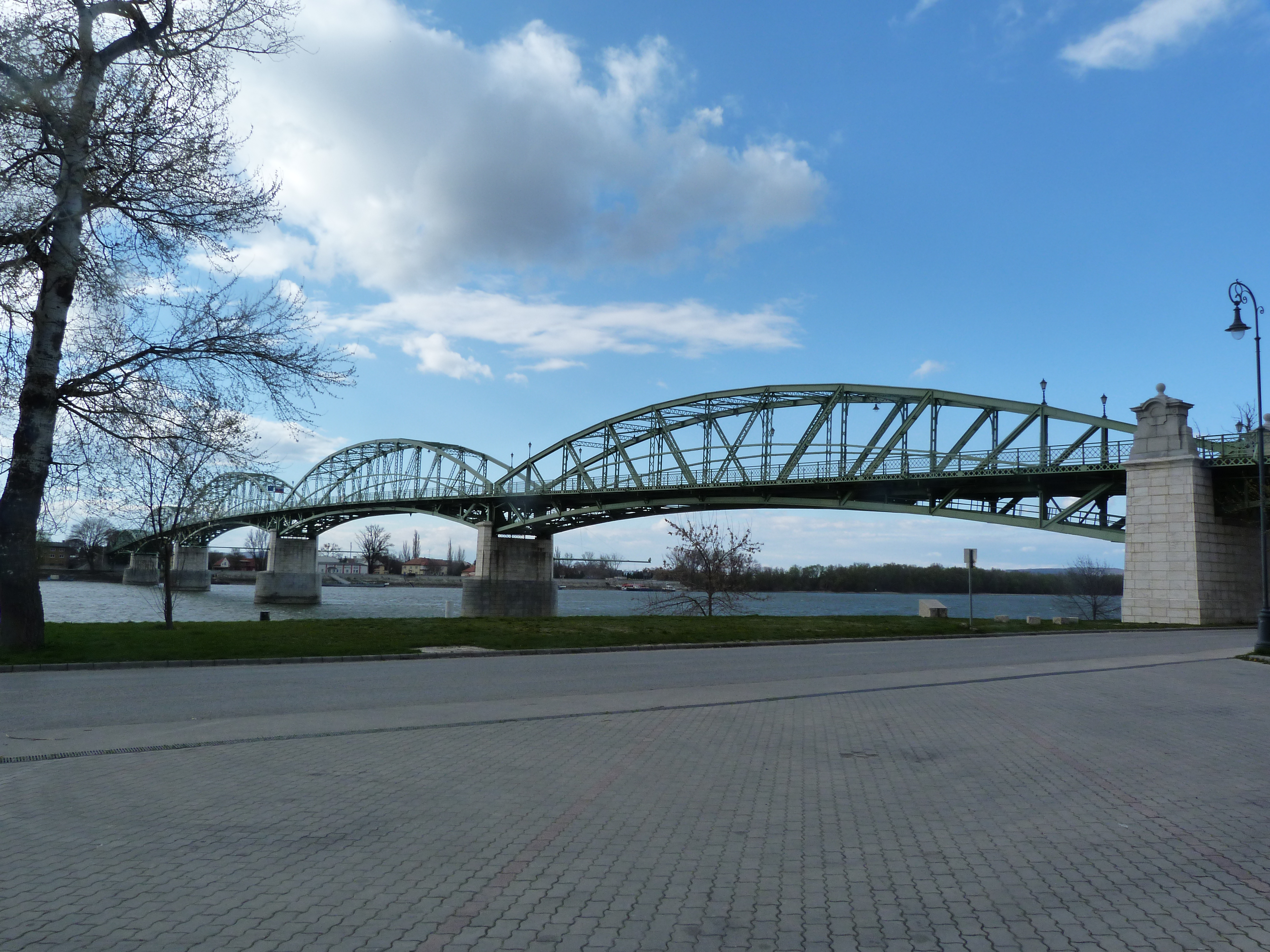 A felvételek 2014. március 19 –én szerdán készültek Esztergomban. Szeles, részben borult idő. ©© Derzsi Elekes Andor, Budapest, 2014, A kép és filmfelvételek egészben, vagy részletekben másolását, bármilyen úton történő sokszorosítását és felhasználását a szerző ellenérték nélkül, jogutódjaira is kihatóan megengedi. Az engedély kiterjed a kereskedelmi célú hasznosításra is. Kéri azonban nevének feltüntetését a felhasználás során. A Metapolisz sorozat valamennyi képe és filmje Creative Commons alatti valamint kereskedelmi - for profit - célra is felhasználható. Ajánlott hivatkozás: Derzsi Elekes Andor: Metapolisz DVD line